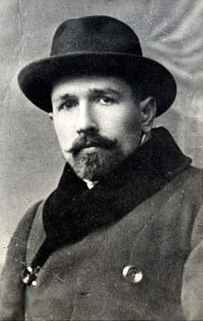 Сцяпан Міхайлавіч Некрашэвіч